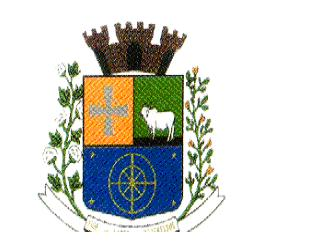 Brasão do município brasileiro de Sandovalina, São Paulo